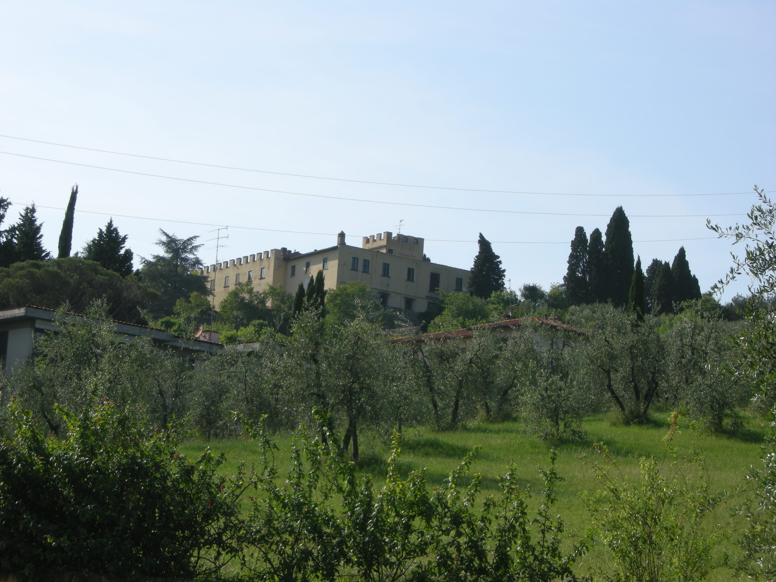 Poggio gherardo, o1